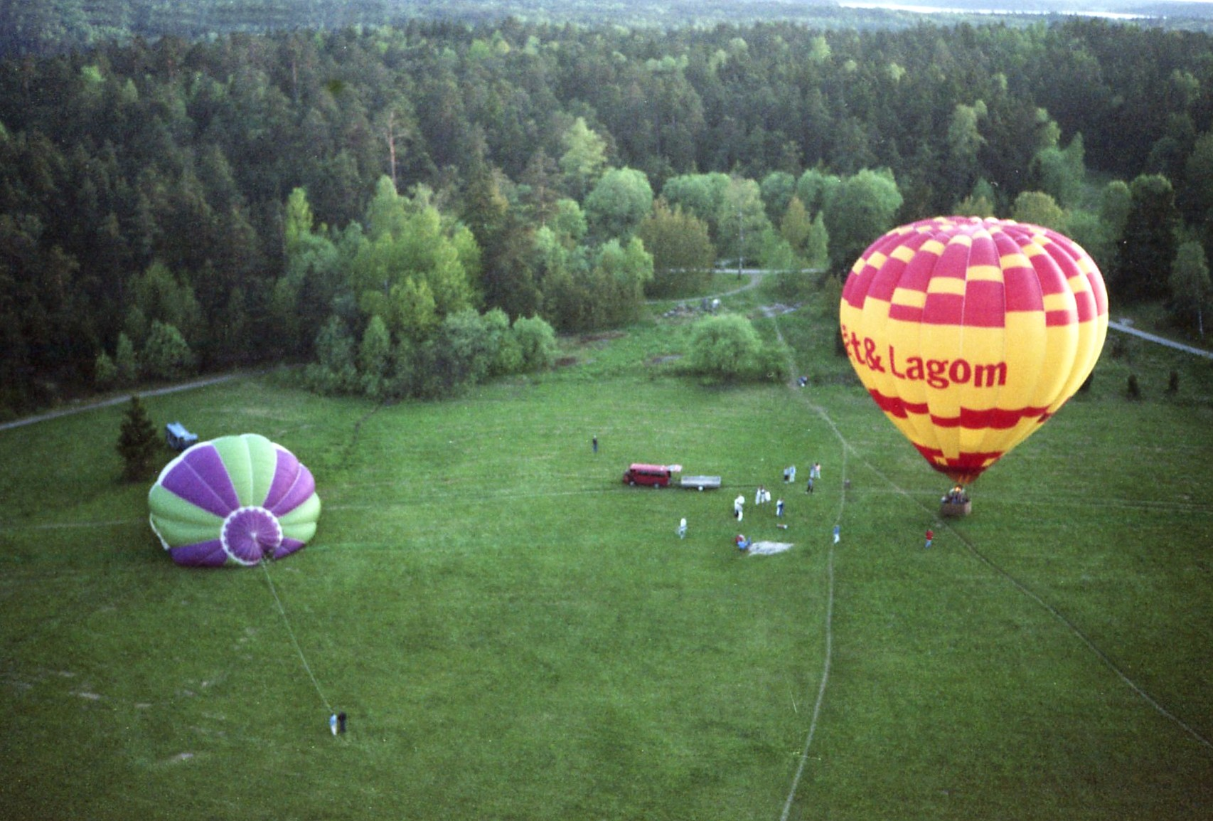 Grimstafältet från ballong i maj 1988